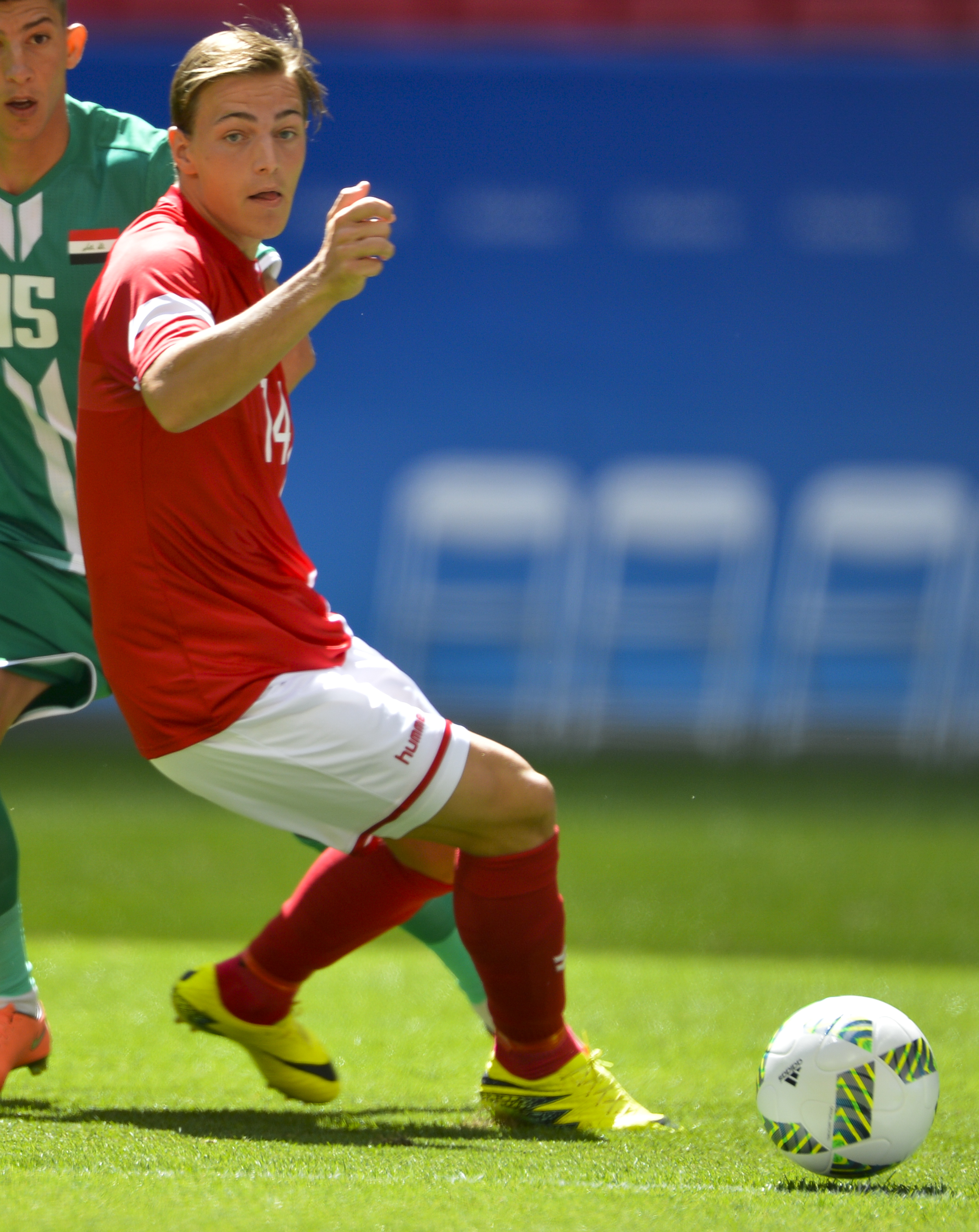 Brasília - A seleção do Iraque enfrenta a seleção da Dinamarca pela primeira fase do futebol olímpico, no estádio Mané Garrincha